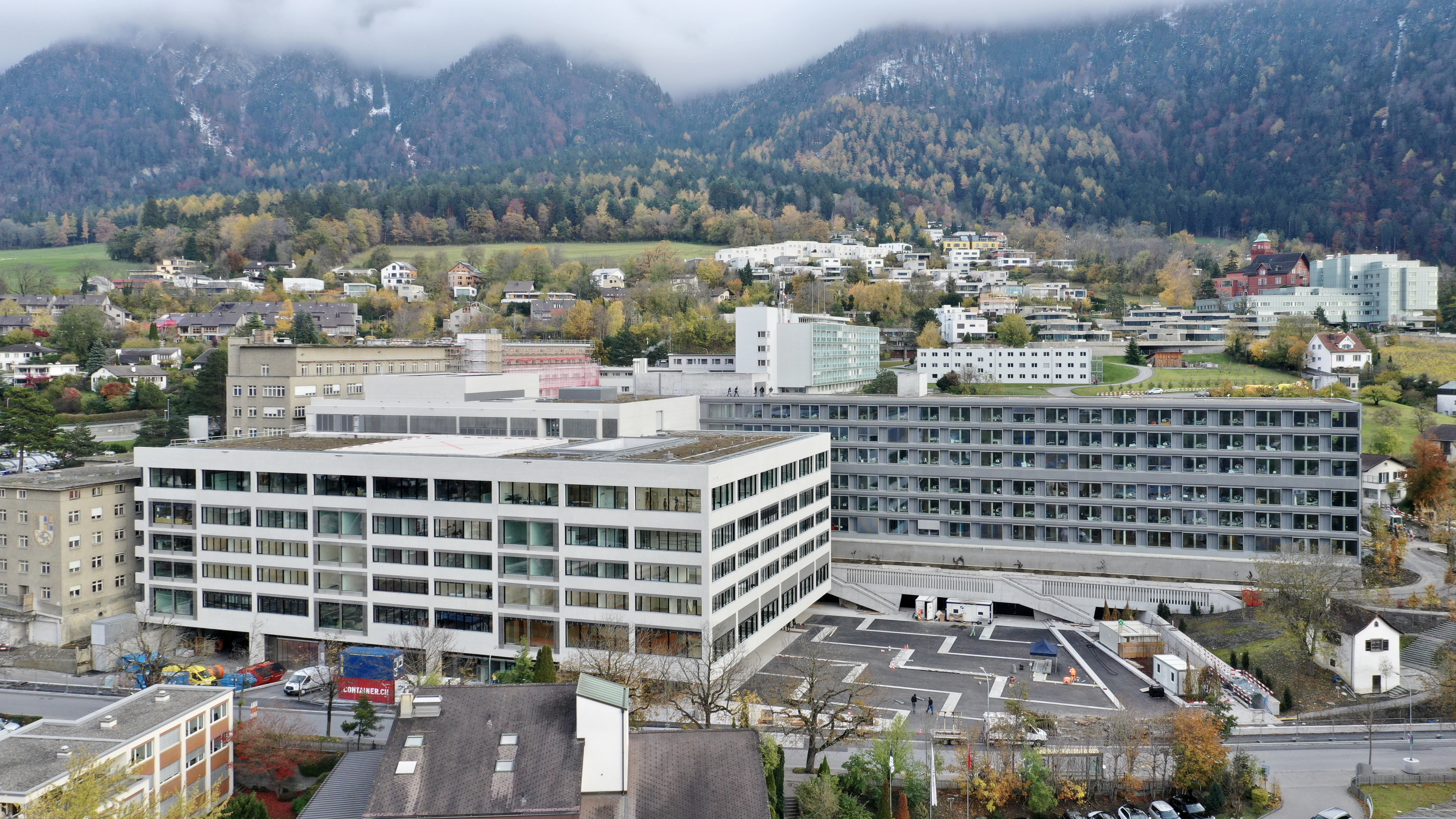 Neubau H1 im Vordergrund links, rechts daneben der neue Spitalplatz. Dahinter das Bettenhaus D.